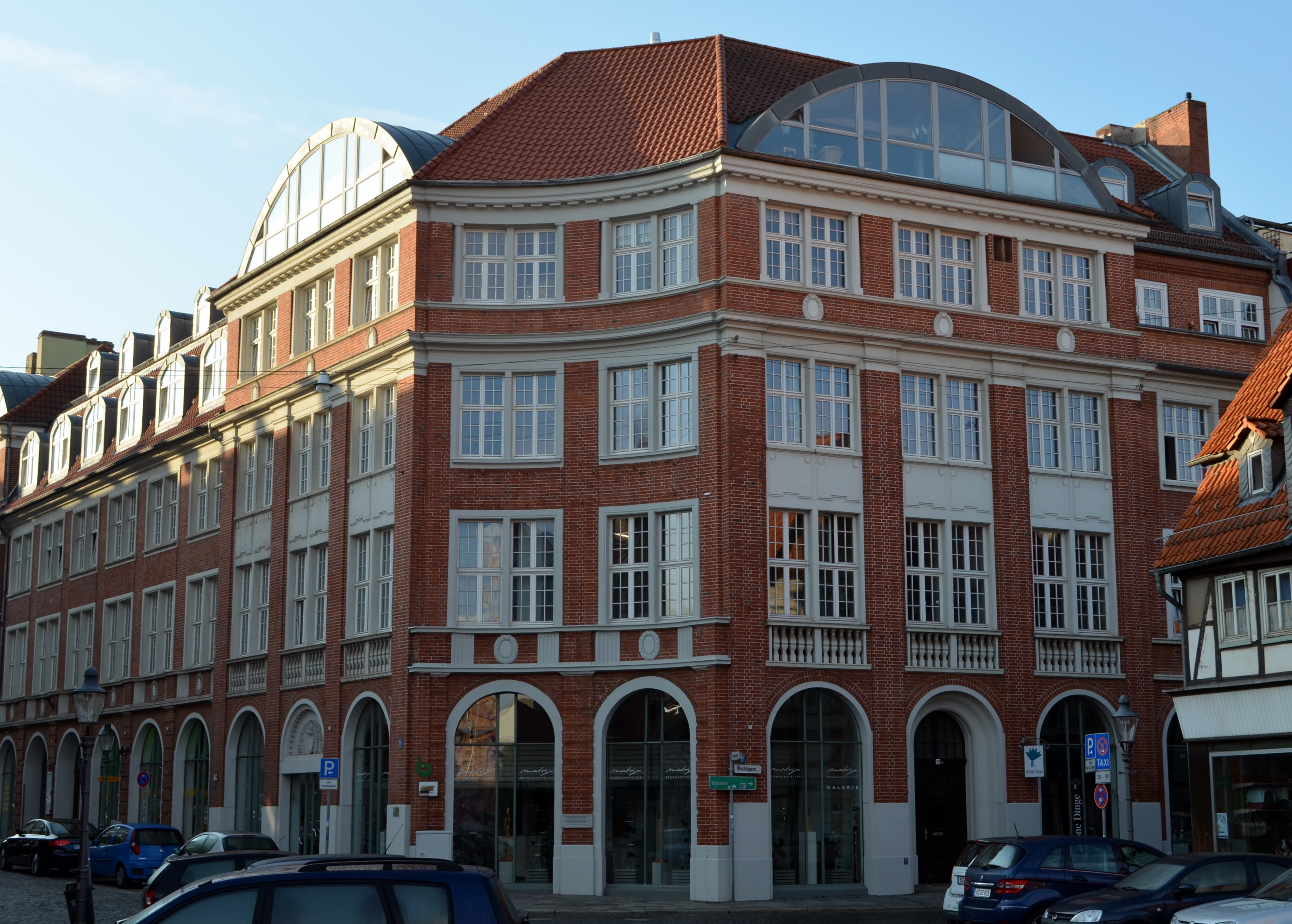 Braunschweig (Magniviertel): Sogenanntes „Volksfreund-Haus“. Benannt nach dem Braunschweiger Volksfreund, der in ihm verlegt wurde. Vom Ackerhof aus gesehen.